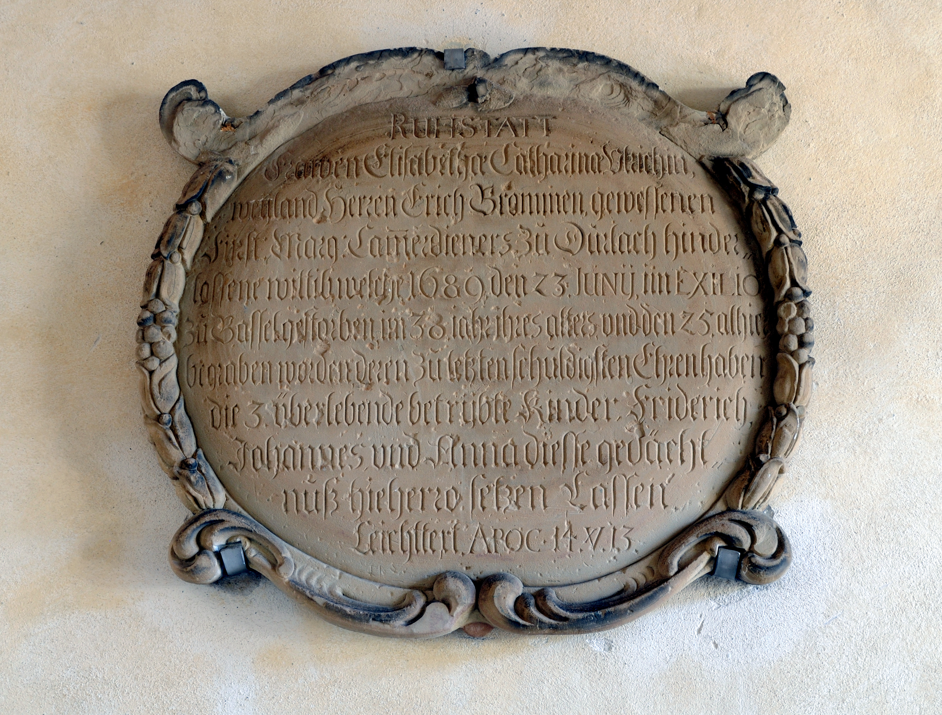 Grenzach-Wyhlen: St. Leodegar, Epitaph zu Elisabeth Catharina Bremmer, geb. Ulrich († 23. Juni 1689)